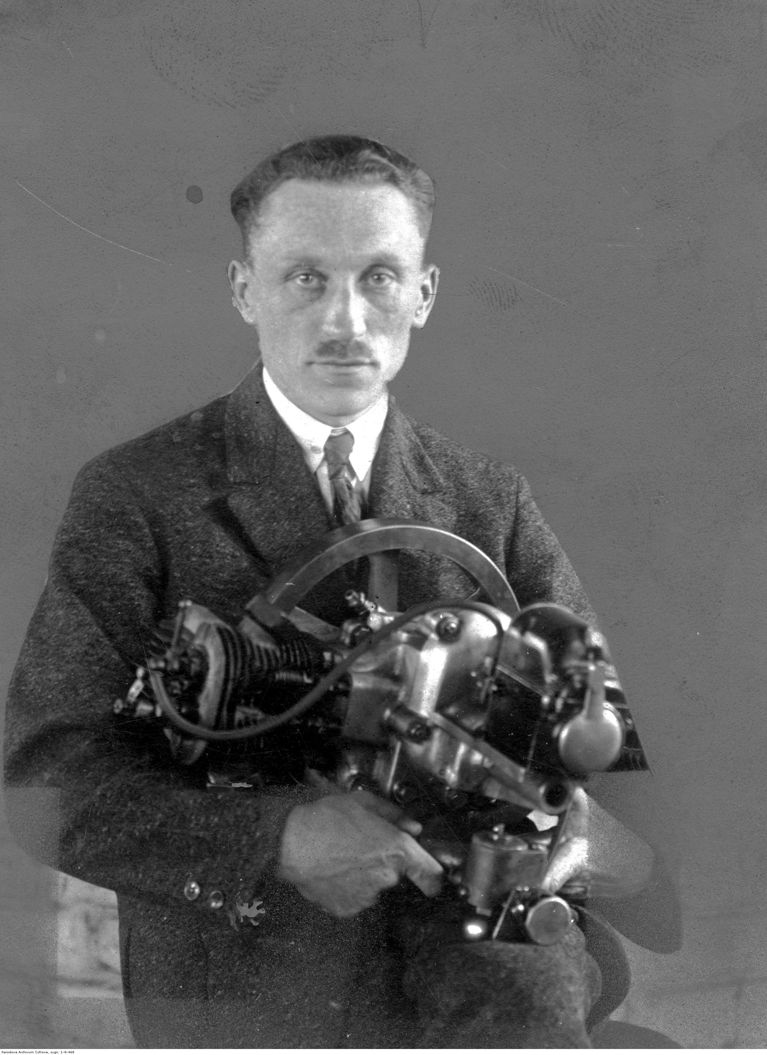 Tadeusz Tański - polski konstruktor samochodowy, inżynier mechanik, wynalazca.